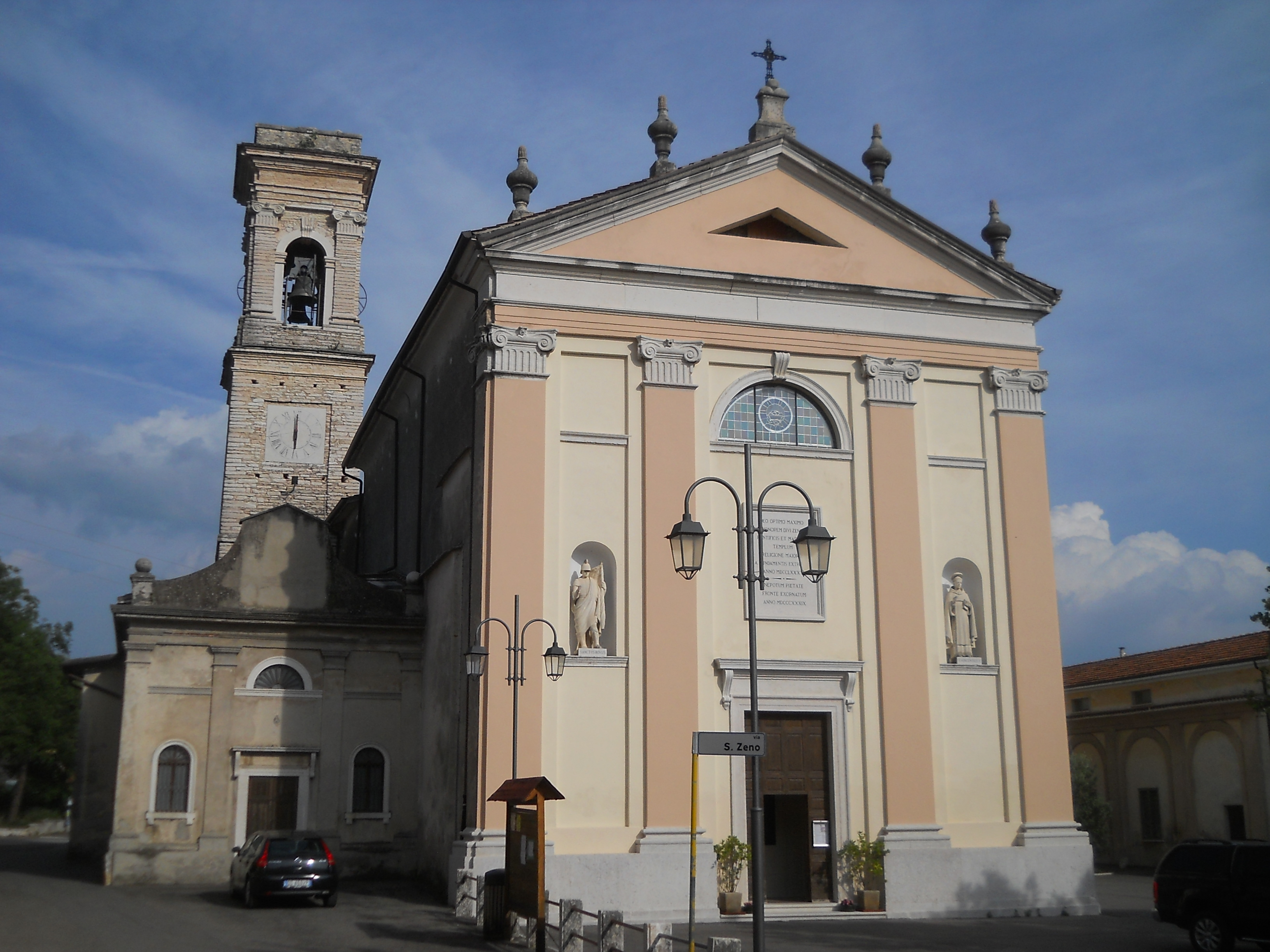 Chiesa Parrocchiale di Cavalo, frazione di Fumane in provinica di Verona